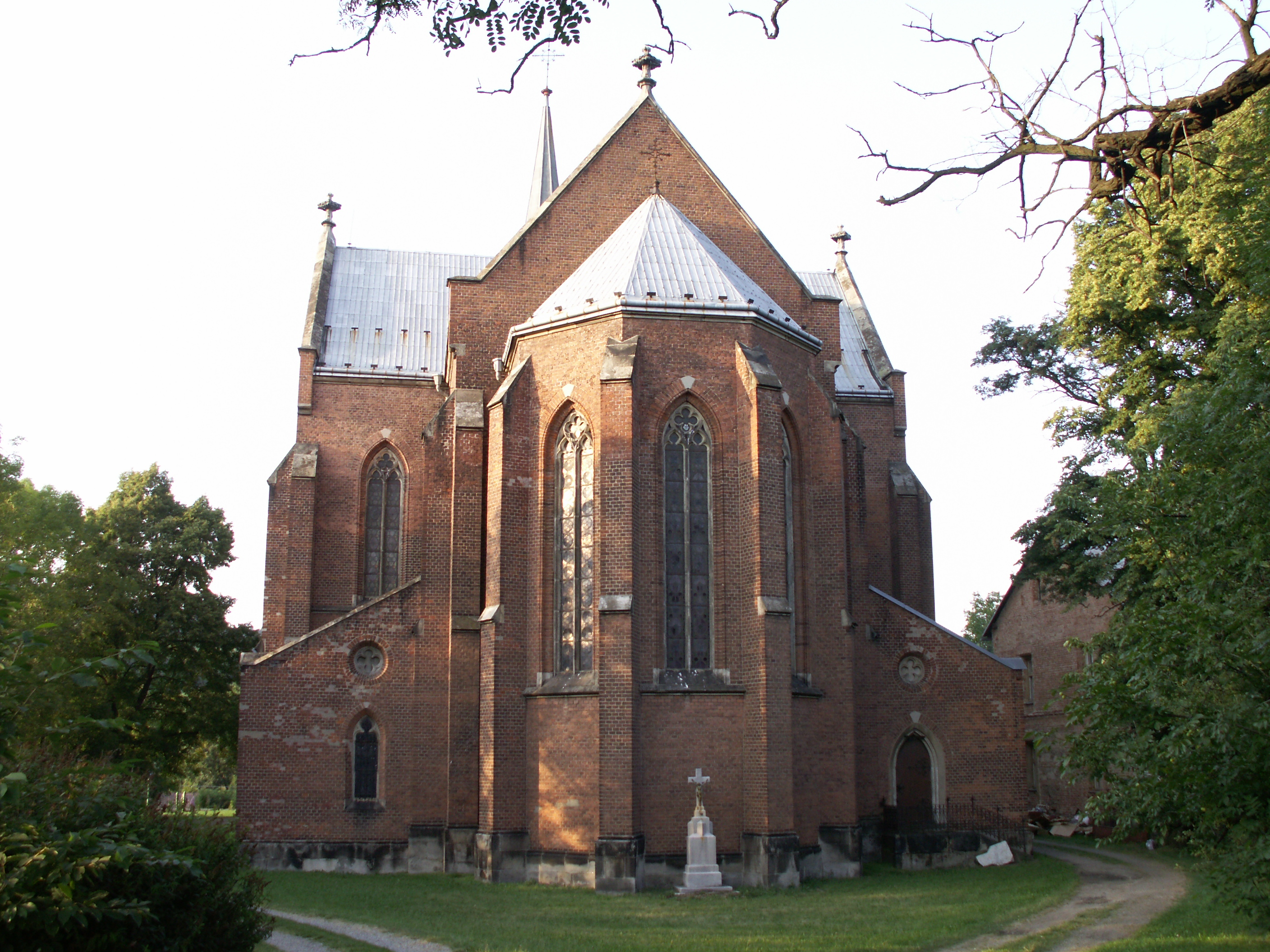 Kostel Nanebevzetí Panny Marie, Liptaň.